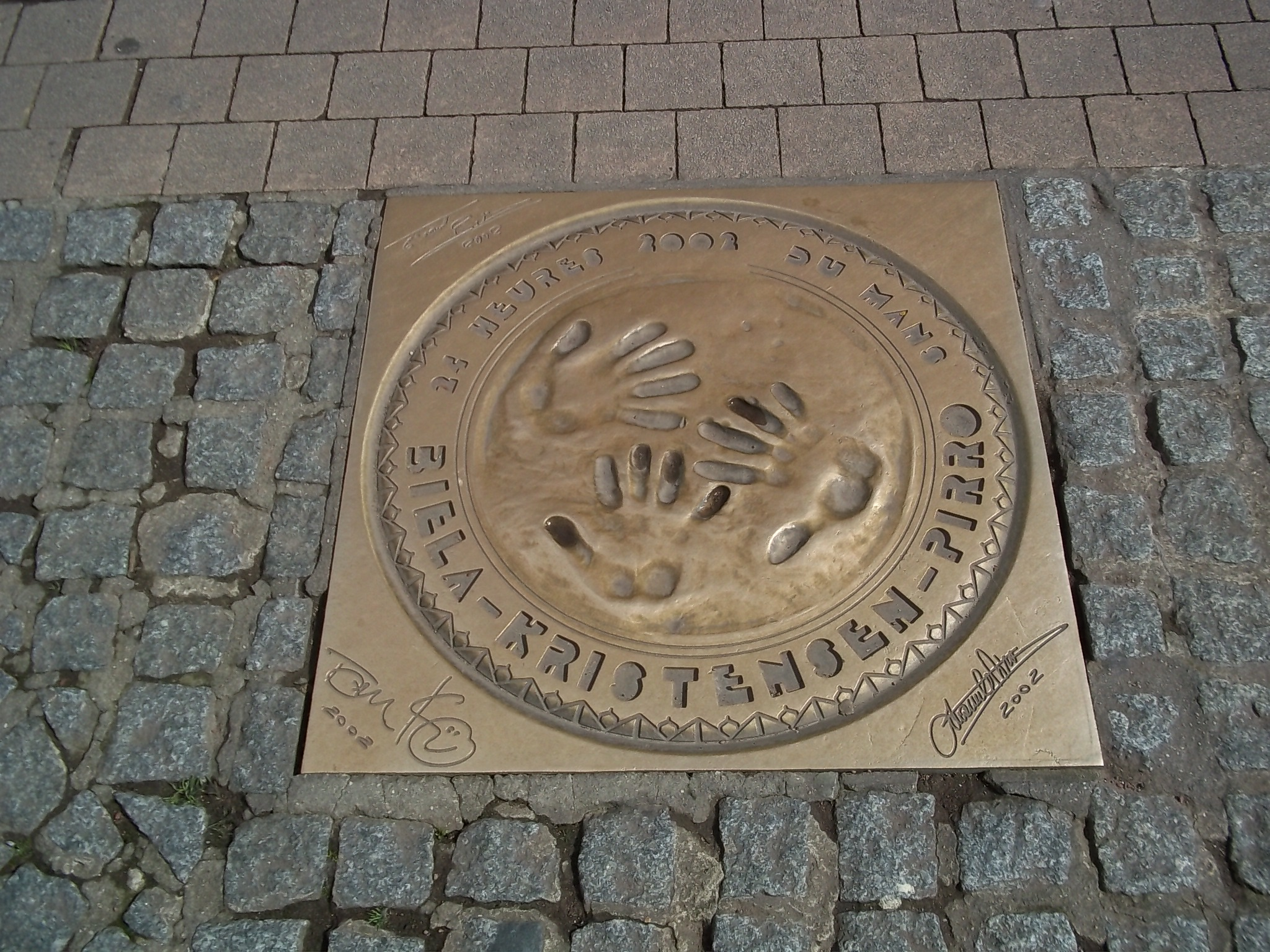 Plaque de bronze des empreintes des vainqueurs des 24 heures 2002